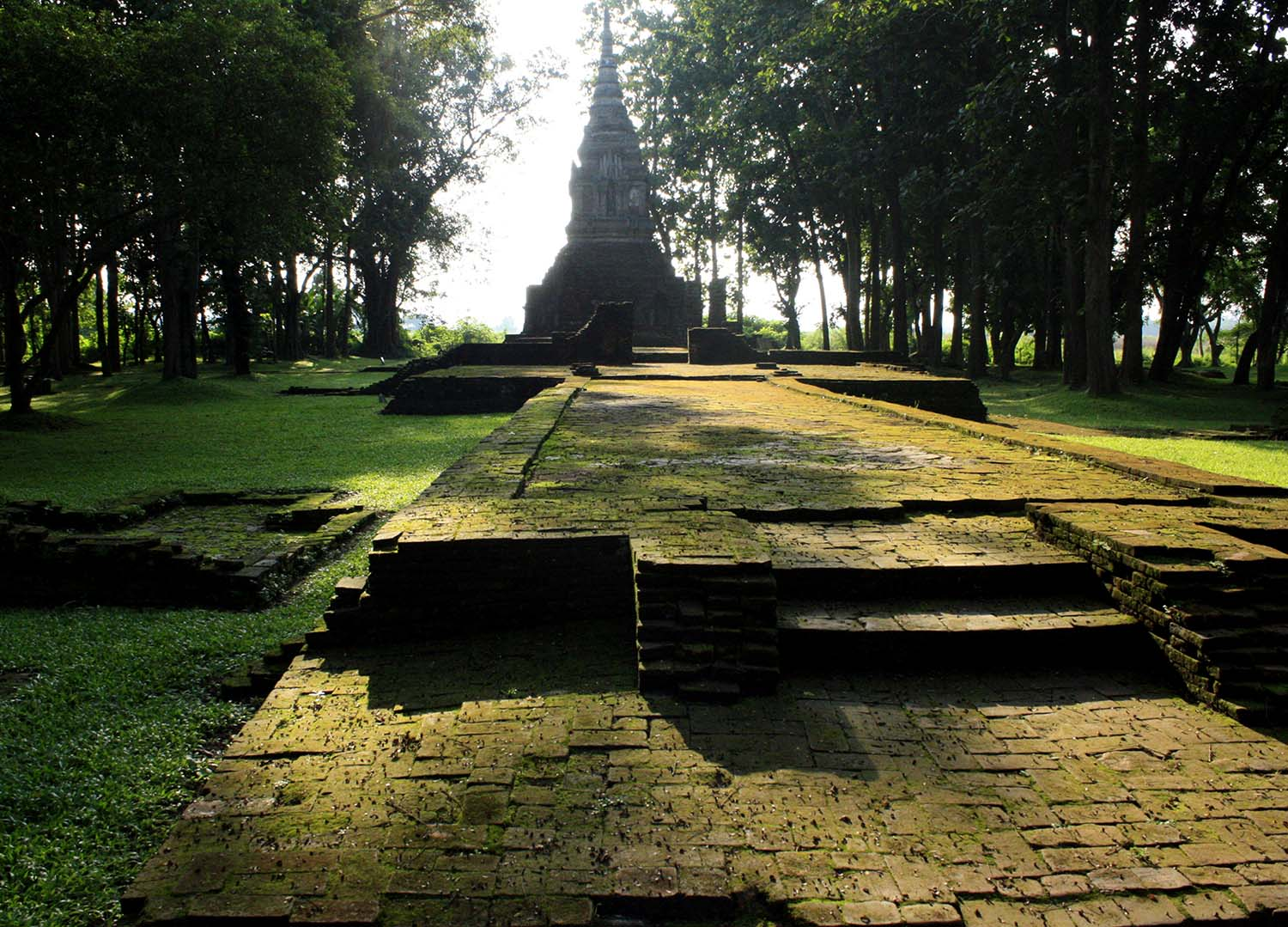 เจดีย์วัดพระธาตุป่าสัก อ.เชียงแสน จ.เชียงราย